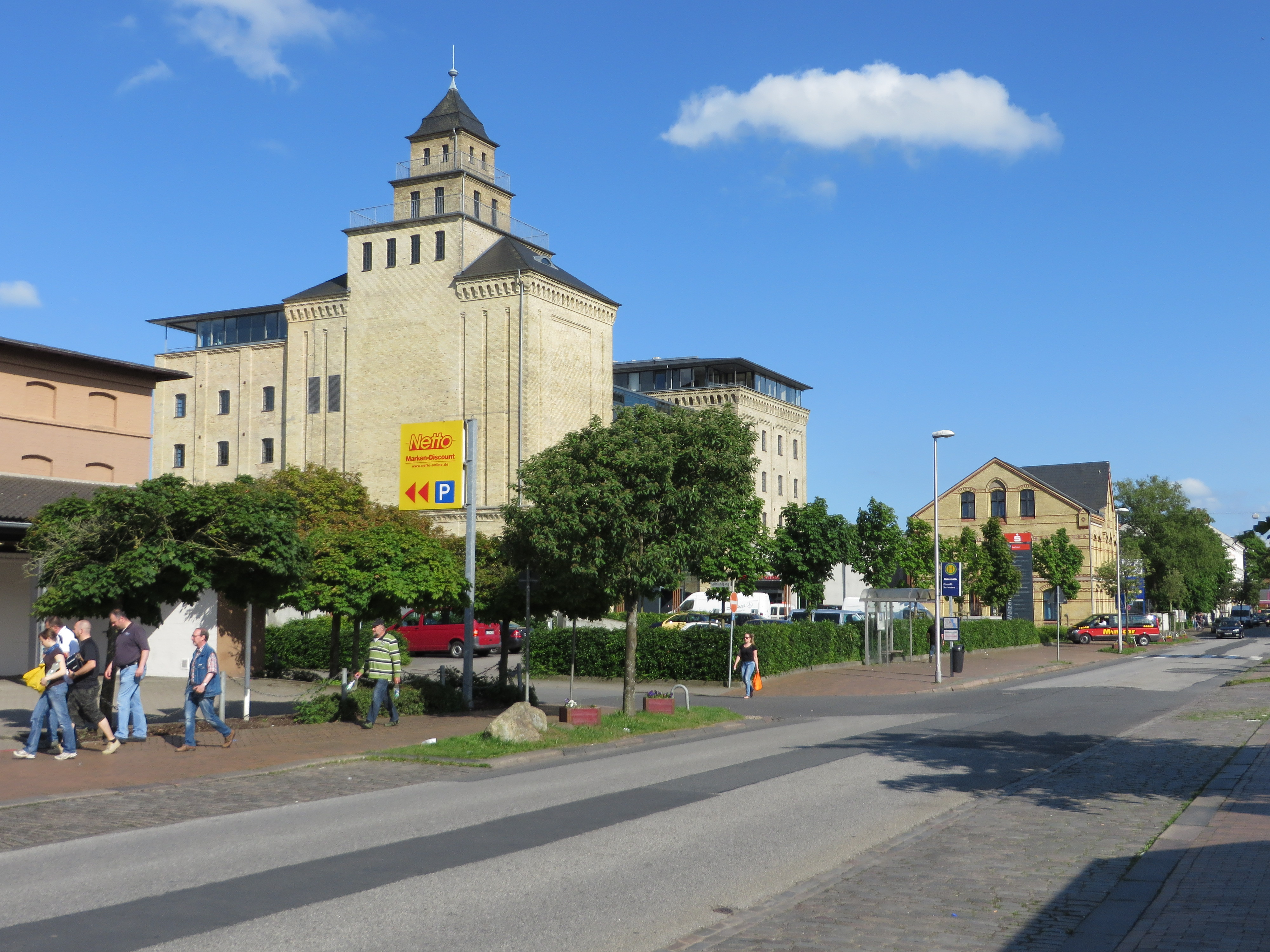 Flensburger Walzenmühle, Bild 001